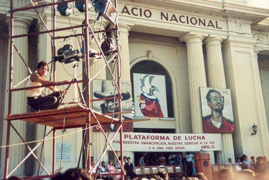 Cartel con la figura de Carlos Fonseca. Nicaragua, 1988.